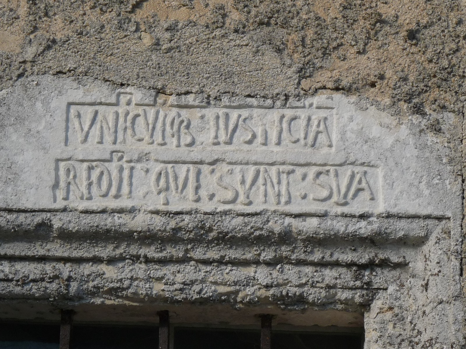 Inscription latine sur la maison en face de l'église, Messac, Charente-Maritime, France : VNICVI..:IVSTICIA:REDIT:QVU:SVNT:SVA [Unicuique justicia reddit quae sunt sua] [Justice gives back to anyone according to his own affairs.]